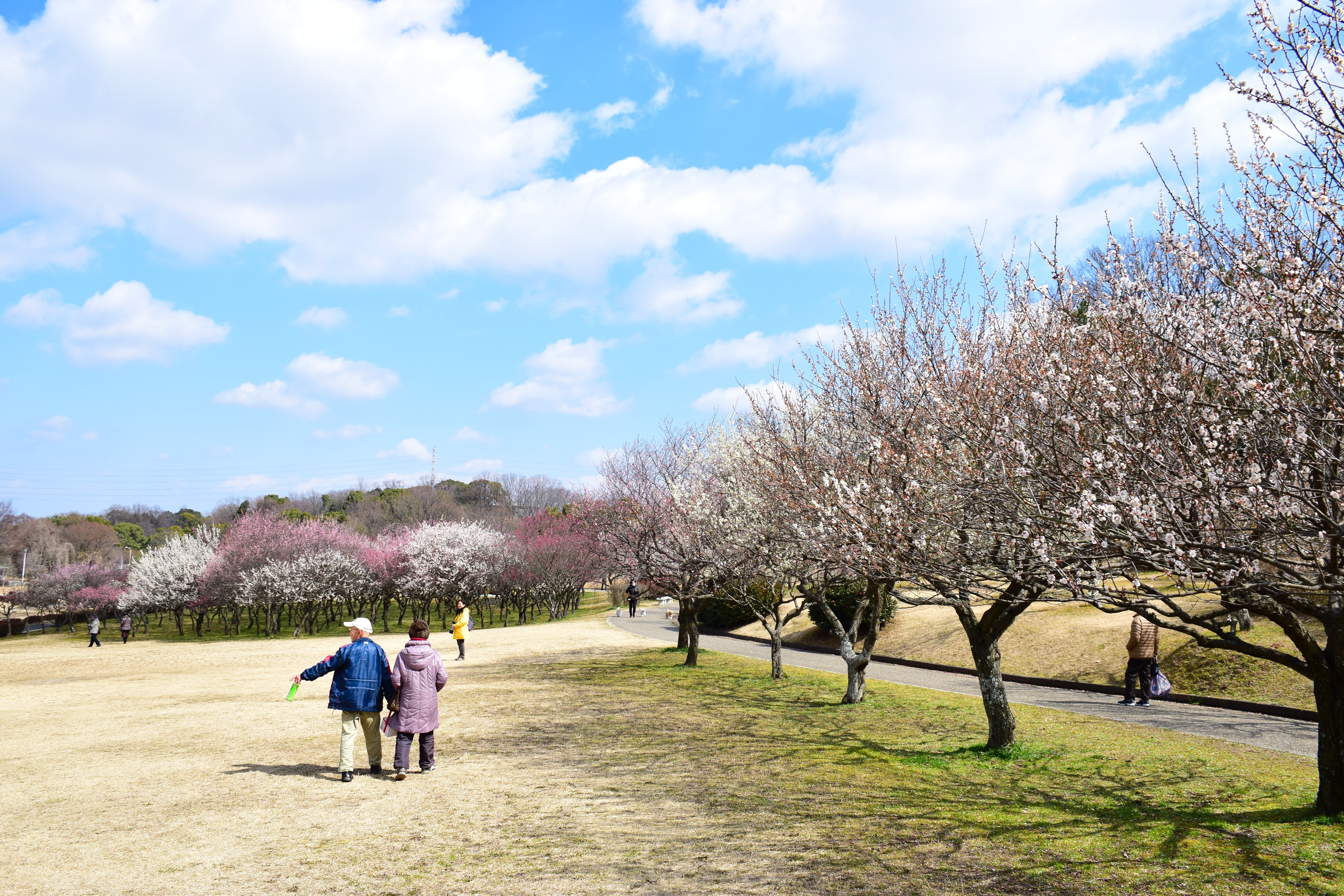 大高緑地の梅林